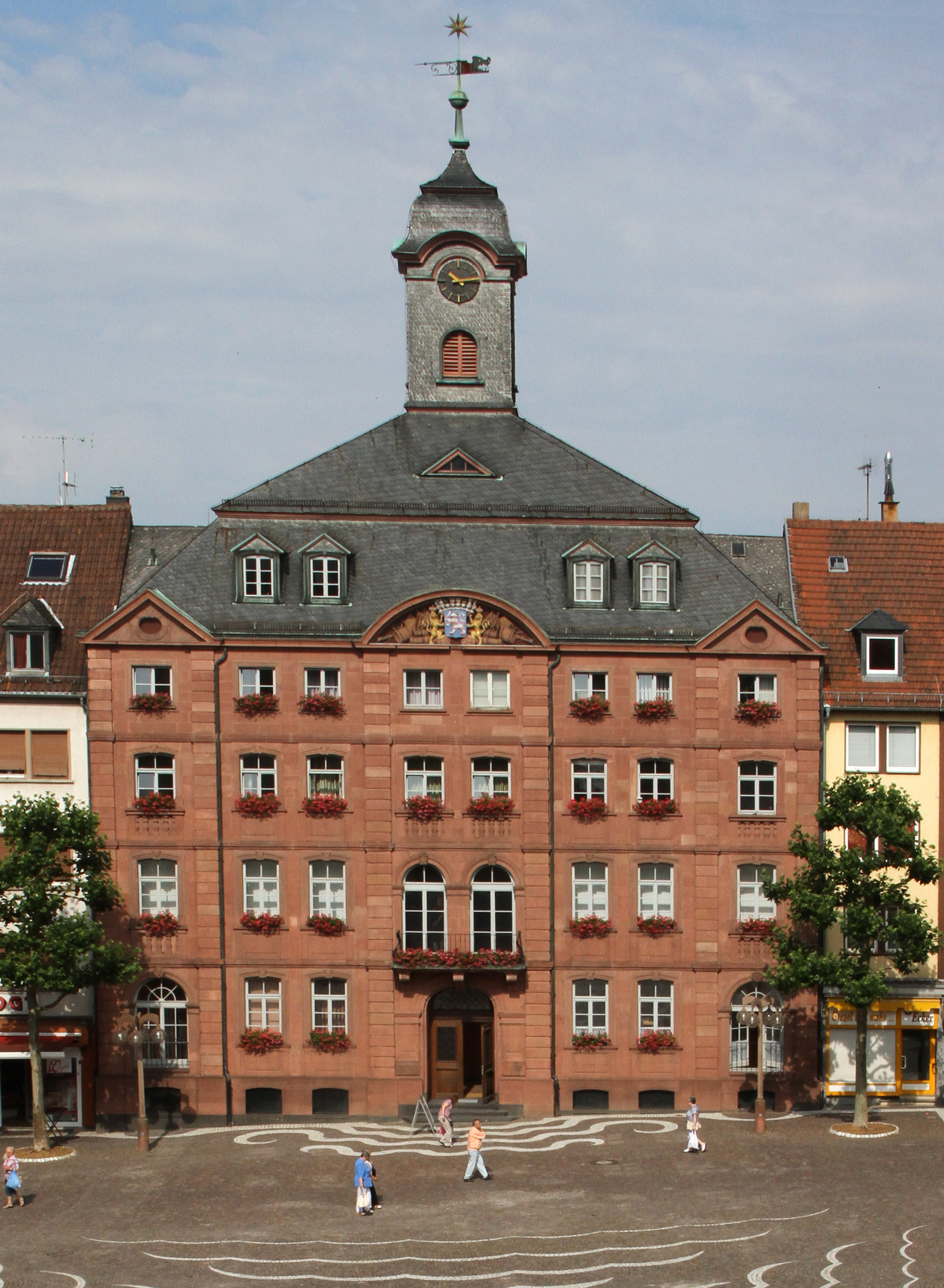 Altes Rathaus in Pirmasens, Hauptstraße 26; stattlicher Mansarddachbau, um 1770, Werkmeister Rochus Pfeiffer, Tirol, wohl nach Plänen des Saarbrücker Baudirektors Friedrich Joachim Stengel